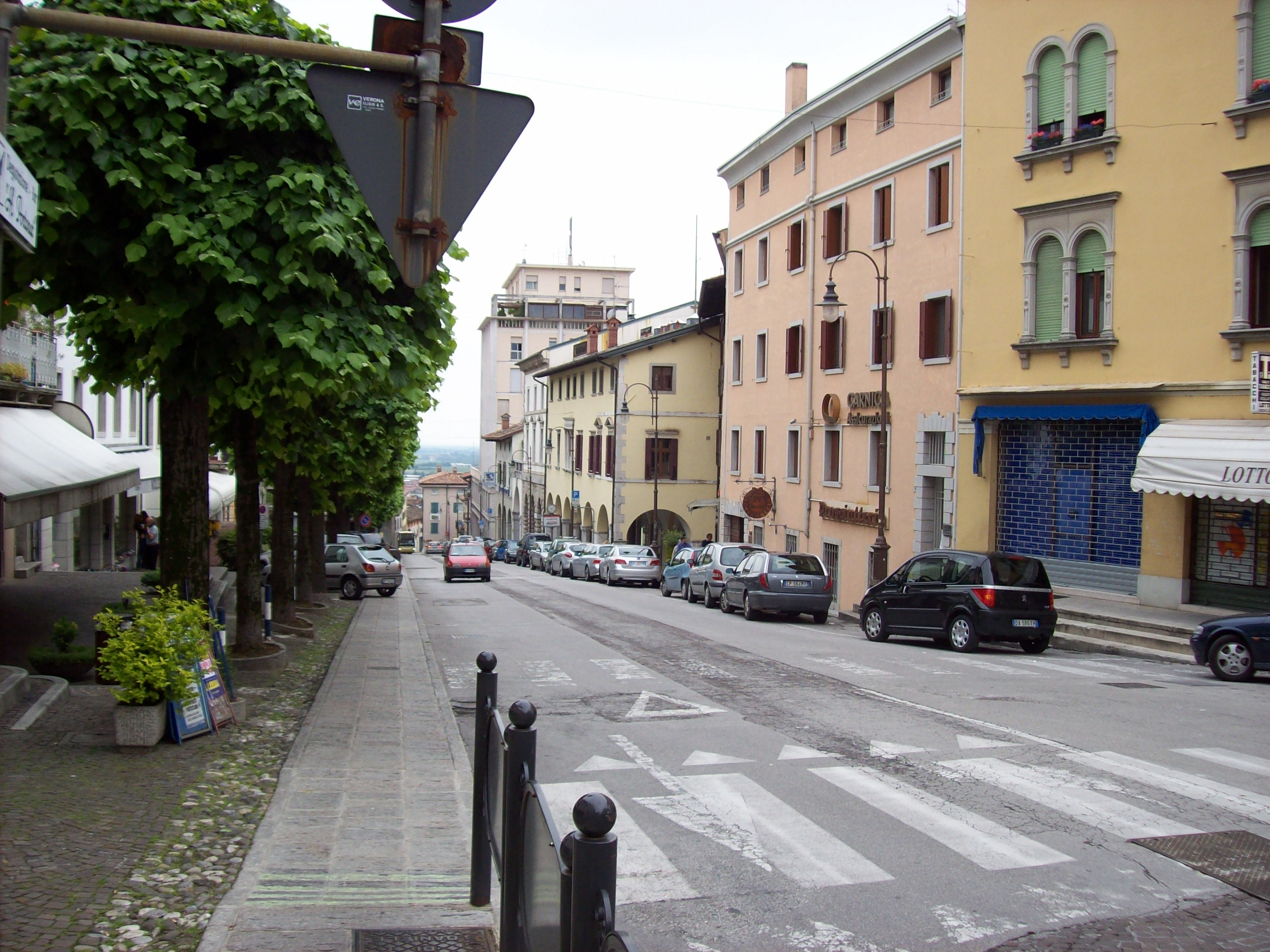 San Daniele del Friuli (UD-Italy), scorcio di Via Umberto I